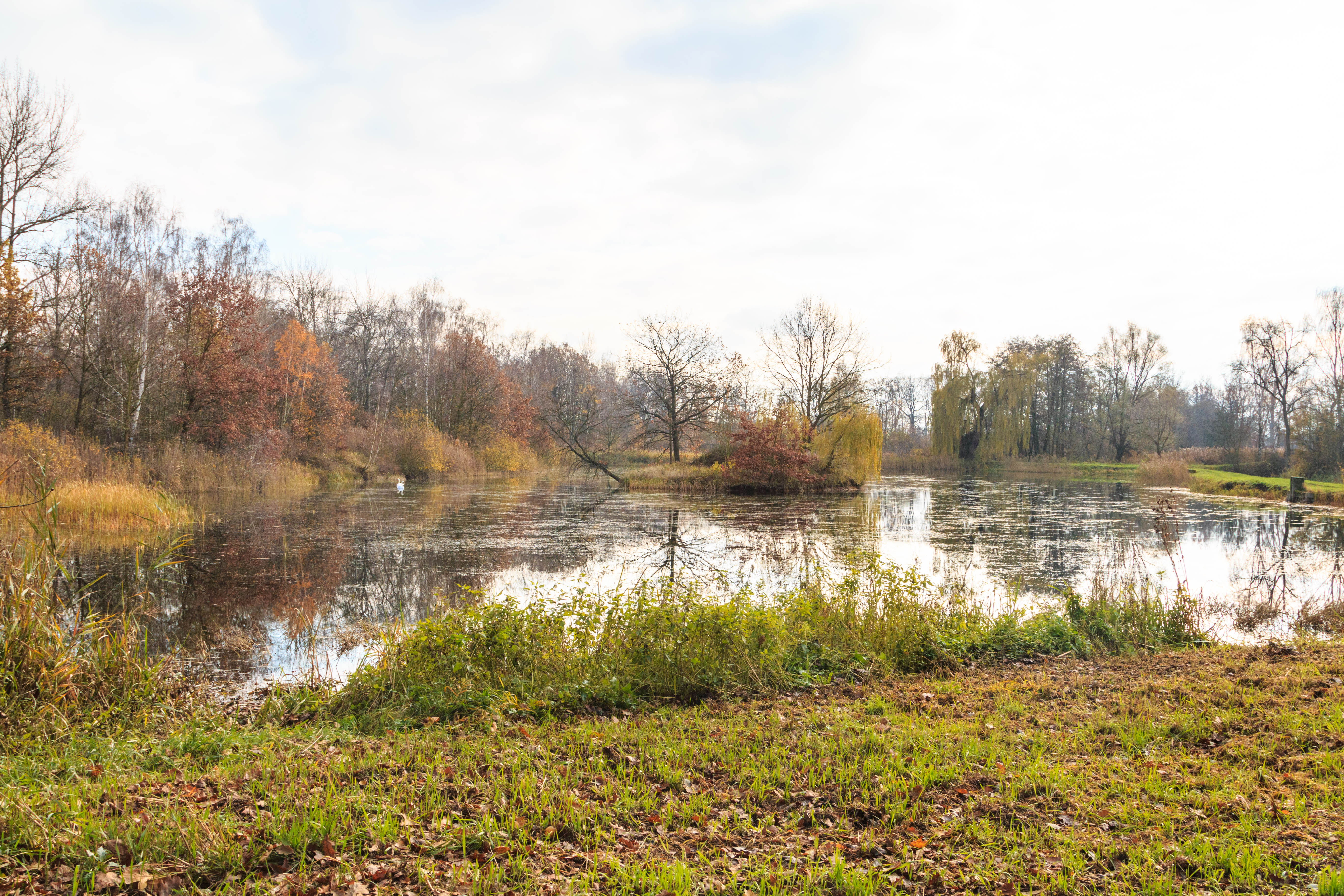 rybníky Nadymače u Lázní Bohdaneč Project: Vodstvo.